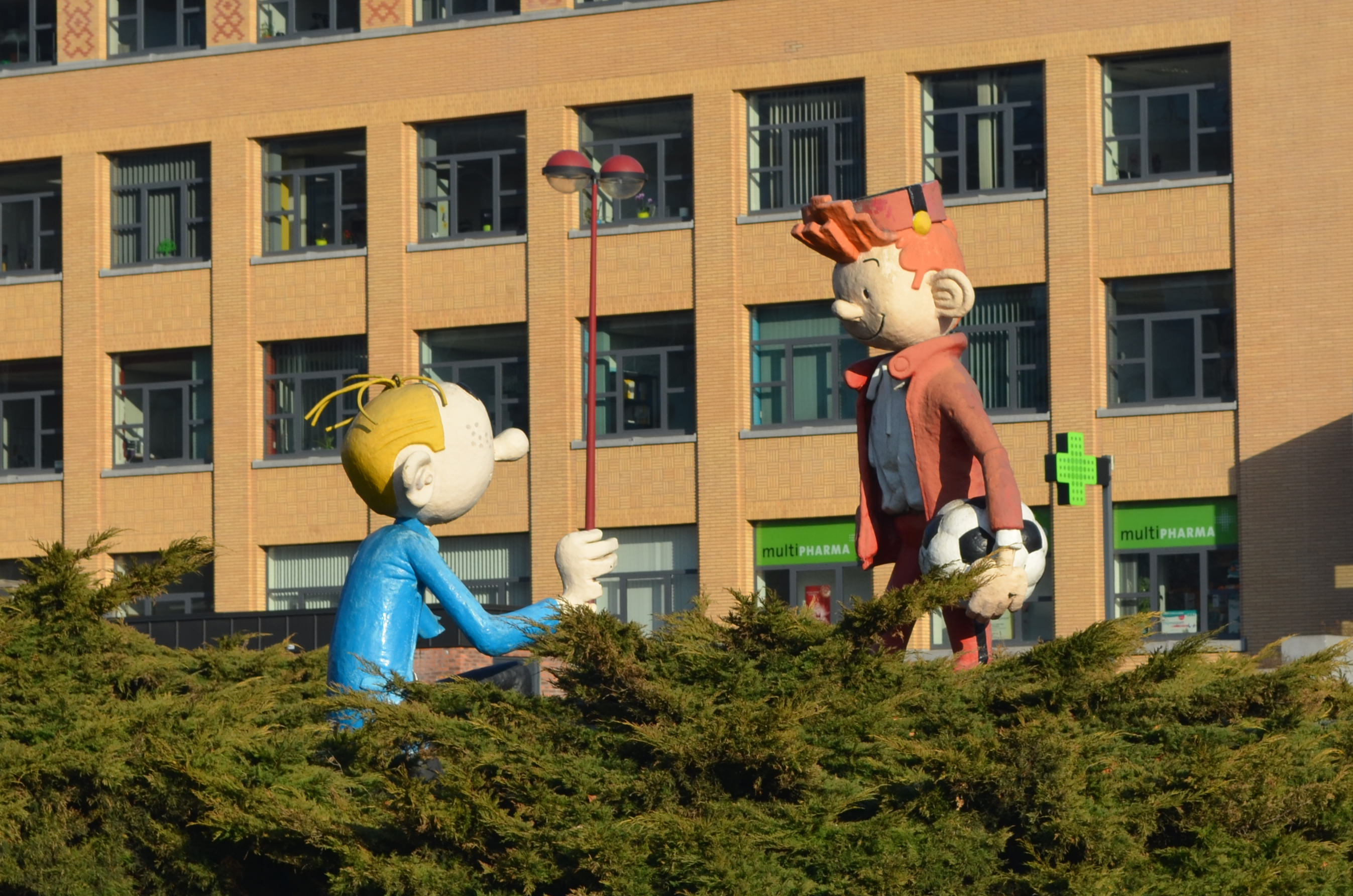 Sculptures de Spirou (à droite) et Fantasio devant la polyclinique du Mambourg à Charleroi.